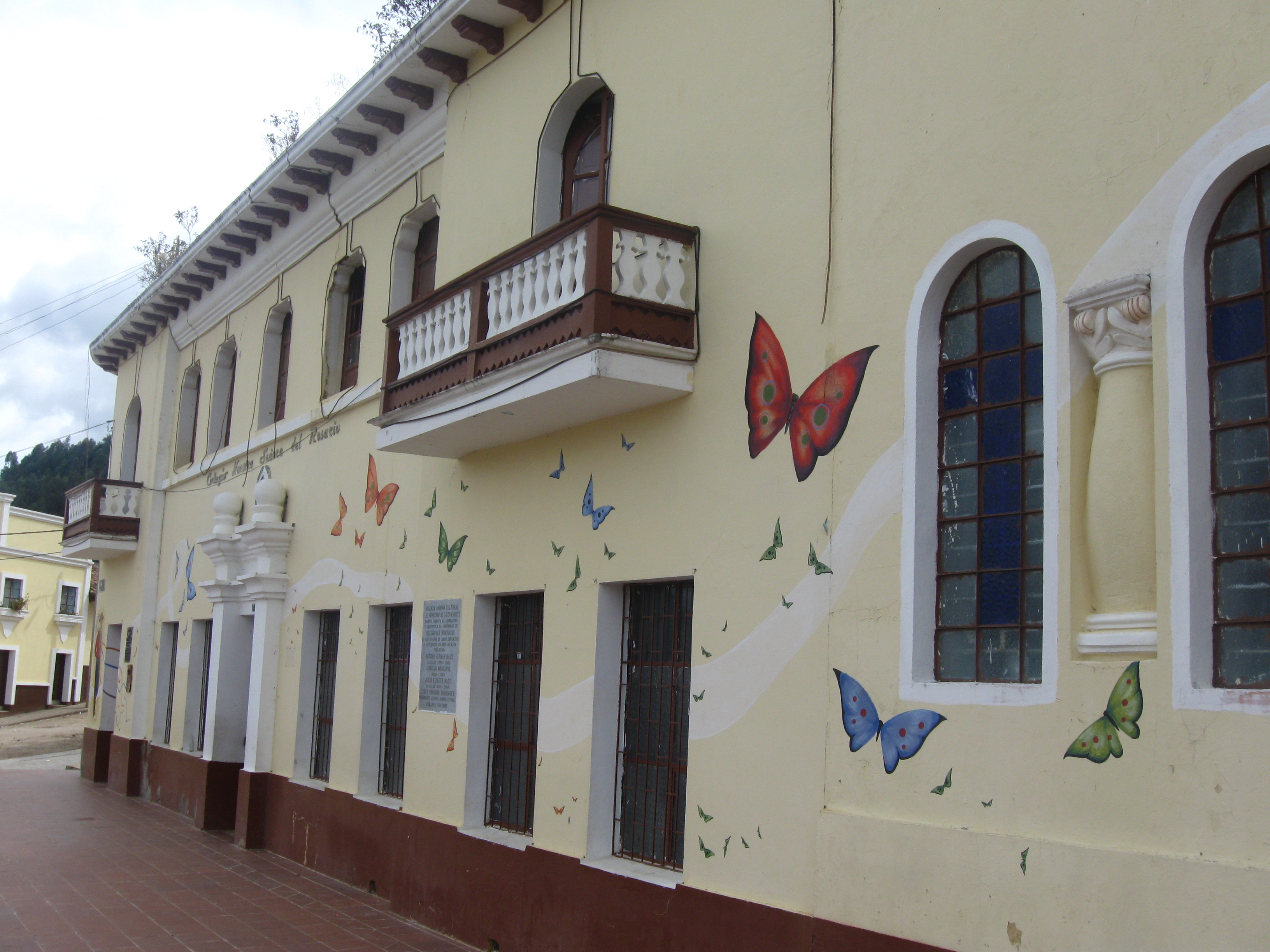 Calle de Sativanorte, Boyaca, Colombia. Muestra de la arquitectura de este pueblo.